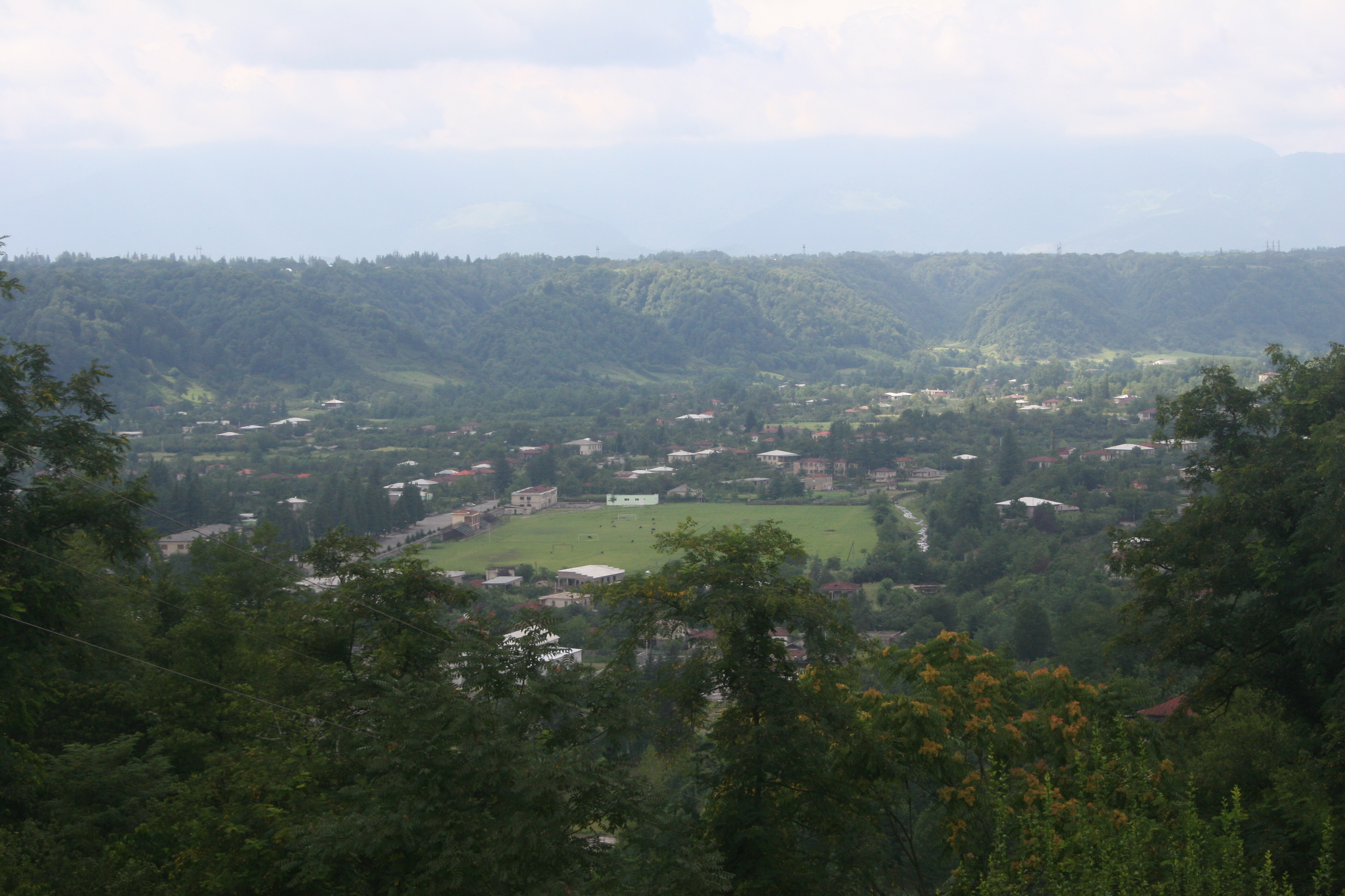 წალენჯიხის სტადიონი. 2007 წ.